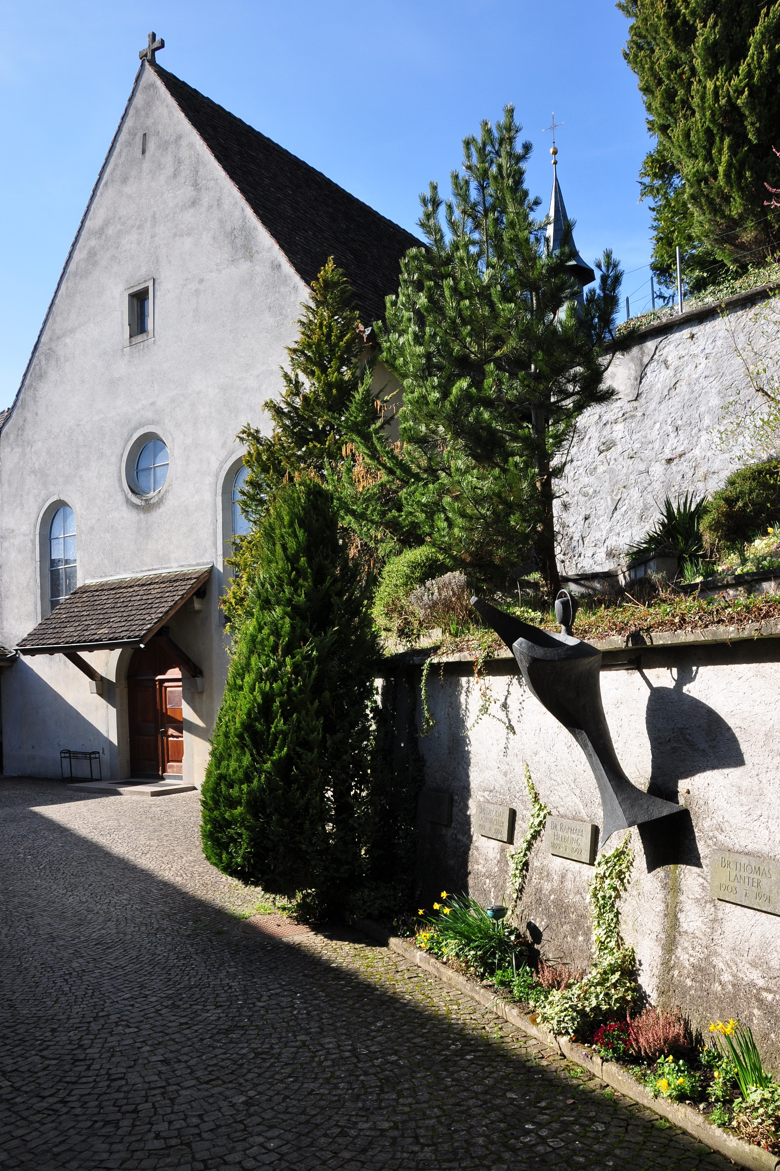 Kapuzinerkloster in Rapperswil (Switzerland)